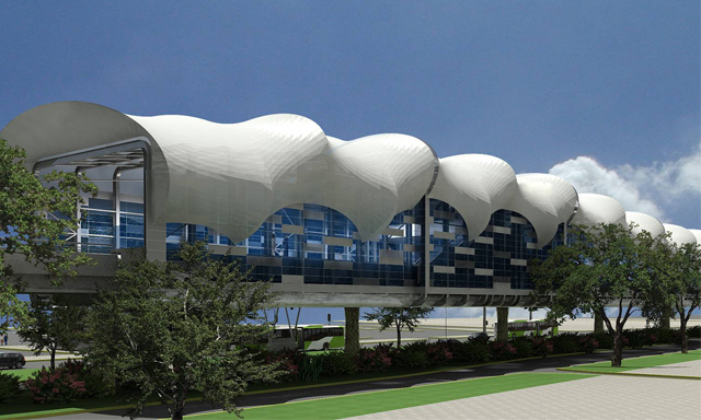 Diagrama de la estación Monte Tabor del Metro de Santiago.